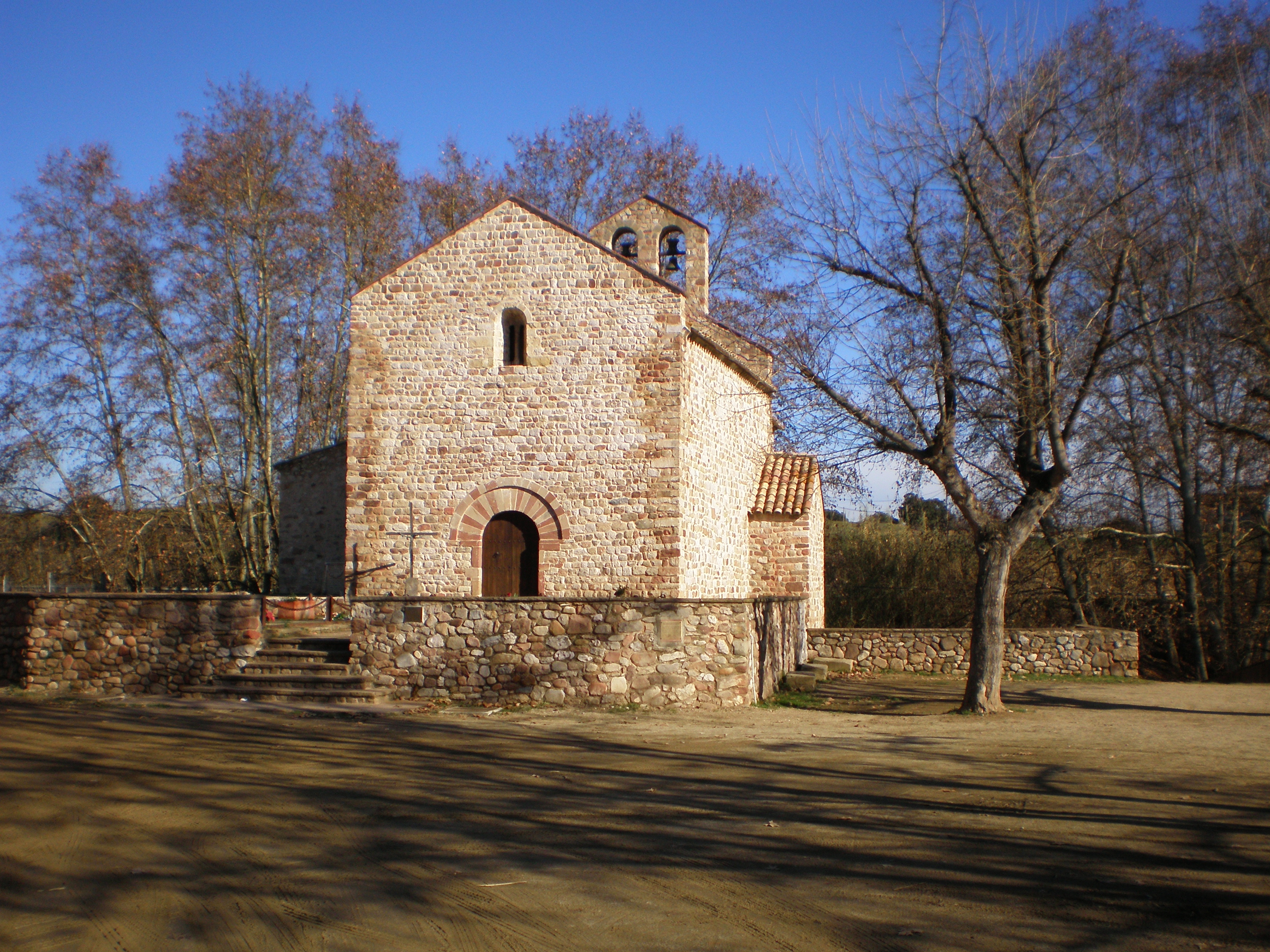 Esglesia romànica de Sta. María de Gallecs (segle XII) a Gallecs (Mollet del Vallès, Vallès Oriental).